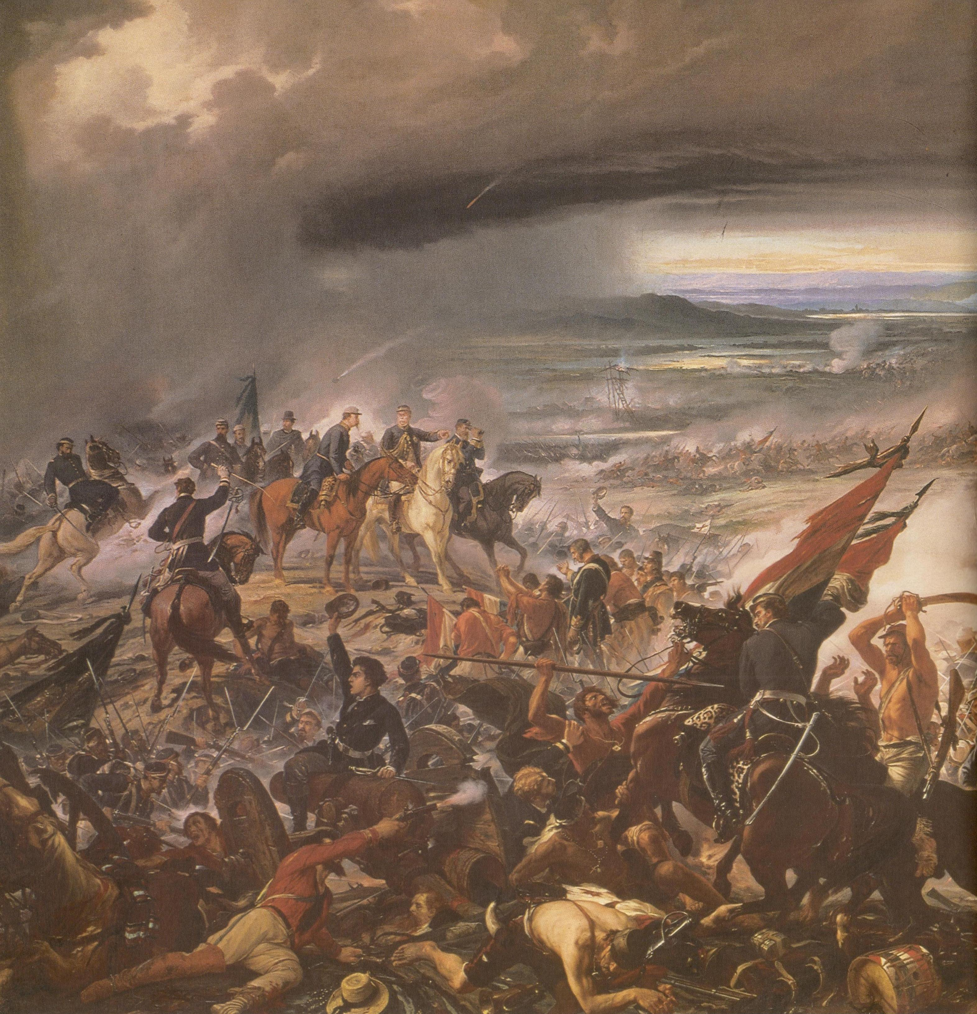 Batalha do Avaí, Museu Nacional de Belas Artes, Brasil